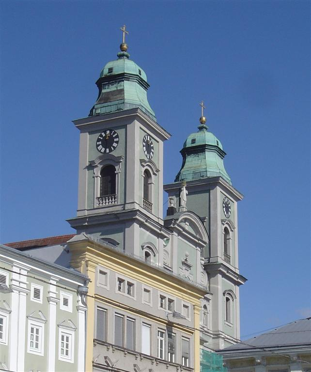 Alter Dom, Linz, Austria